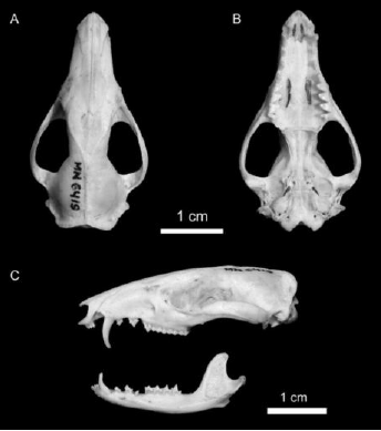 Crânio de Monodelphis scalops, marsupial encontrado em alguns países da América do sul